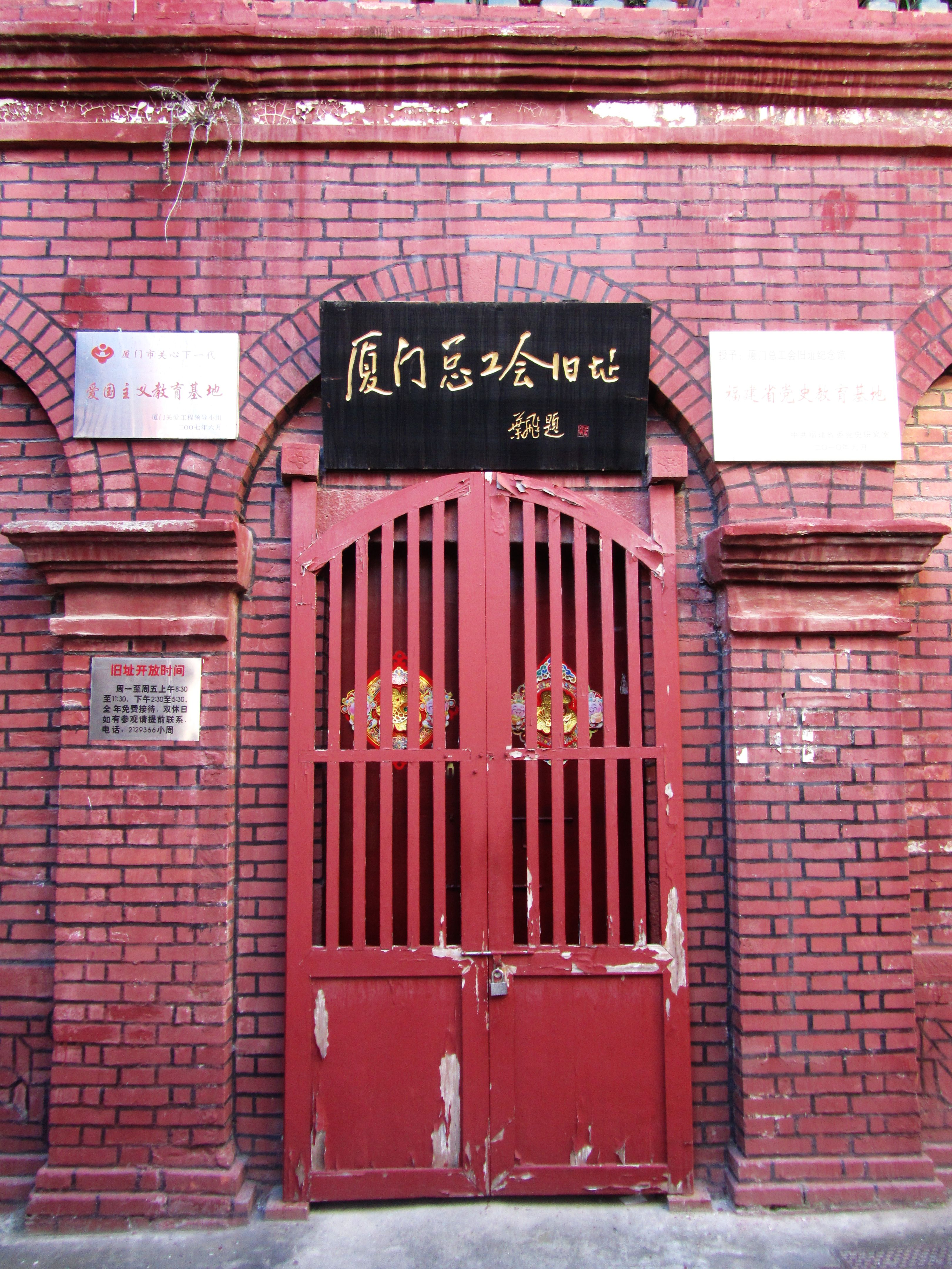 厦门总工会旧址，大门。